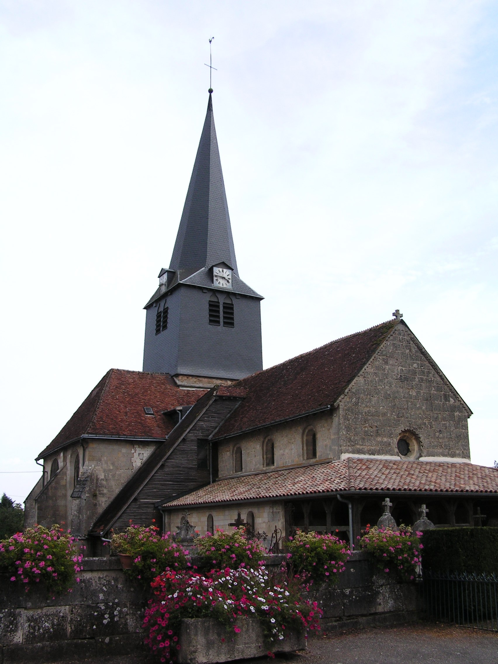 Église Saint-Georges de Larzicourt (Classé) .